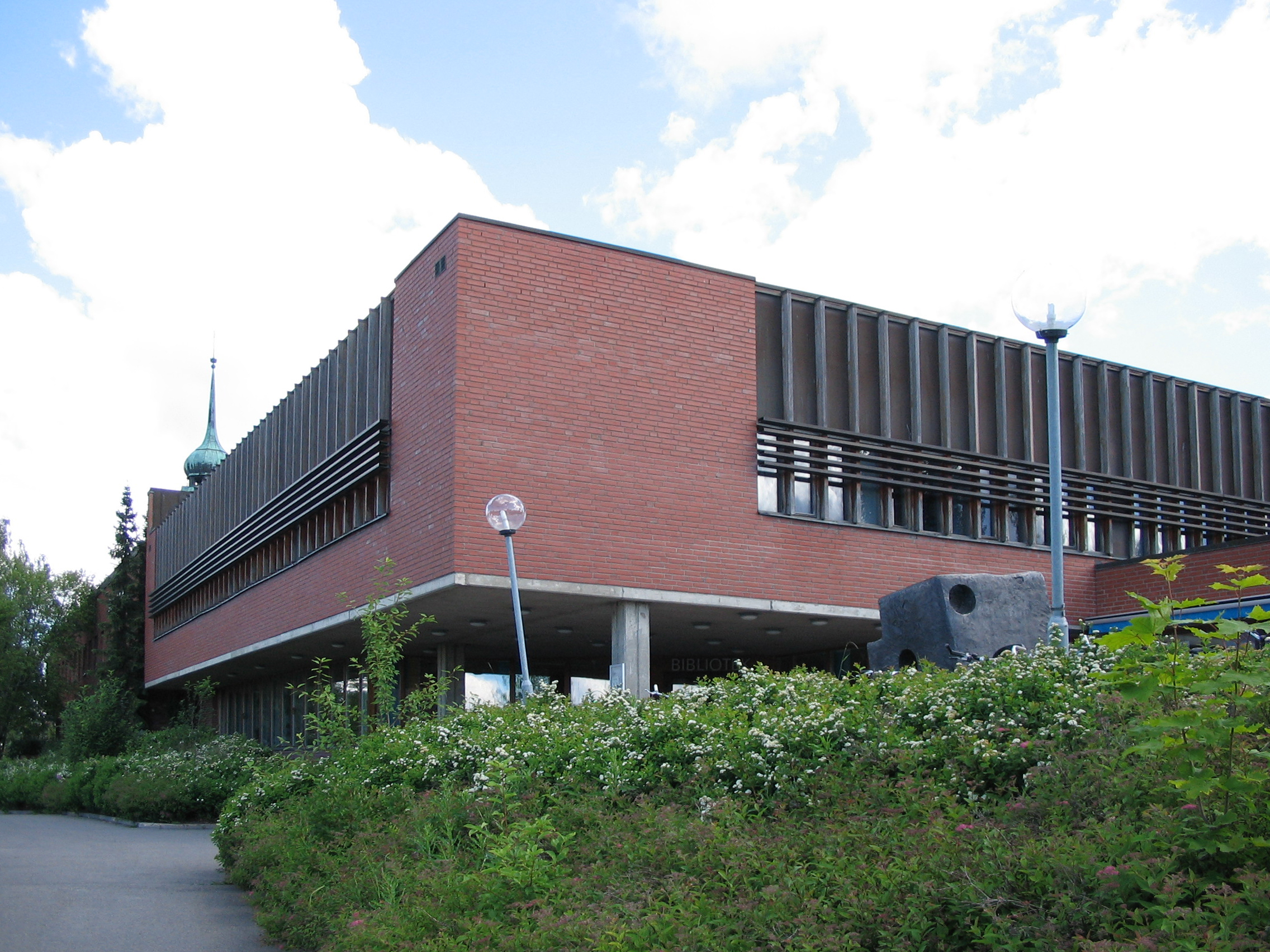 Jämtlands läns bibliotek, Östersund. Huvudbiblioteket vid Rådhusgatan.